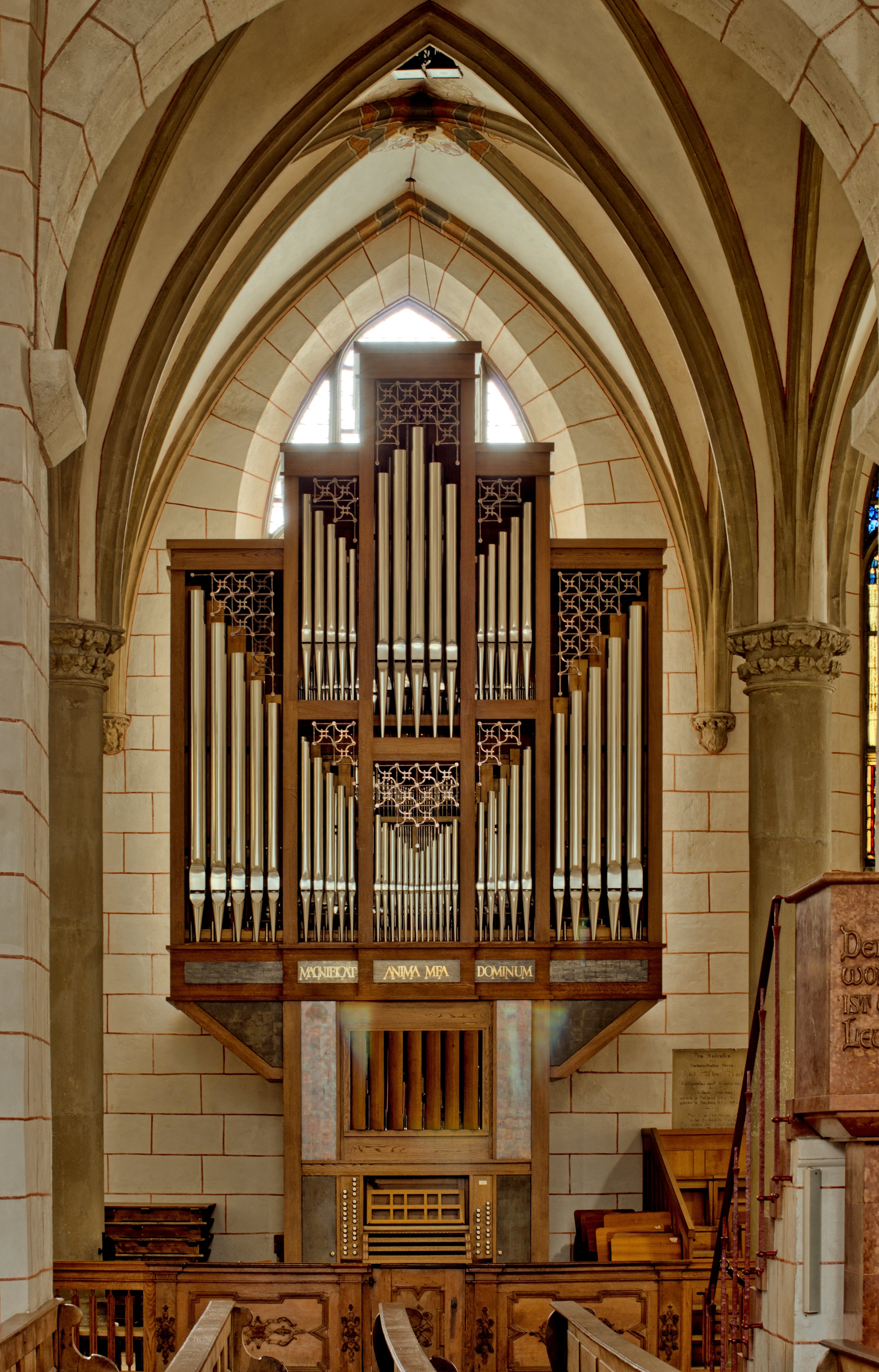 Bilder aus dem Augsburger Dom